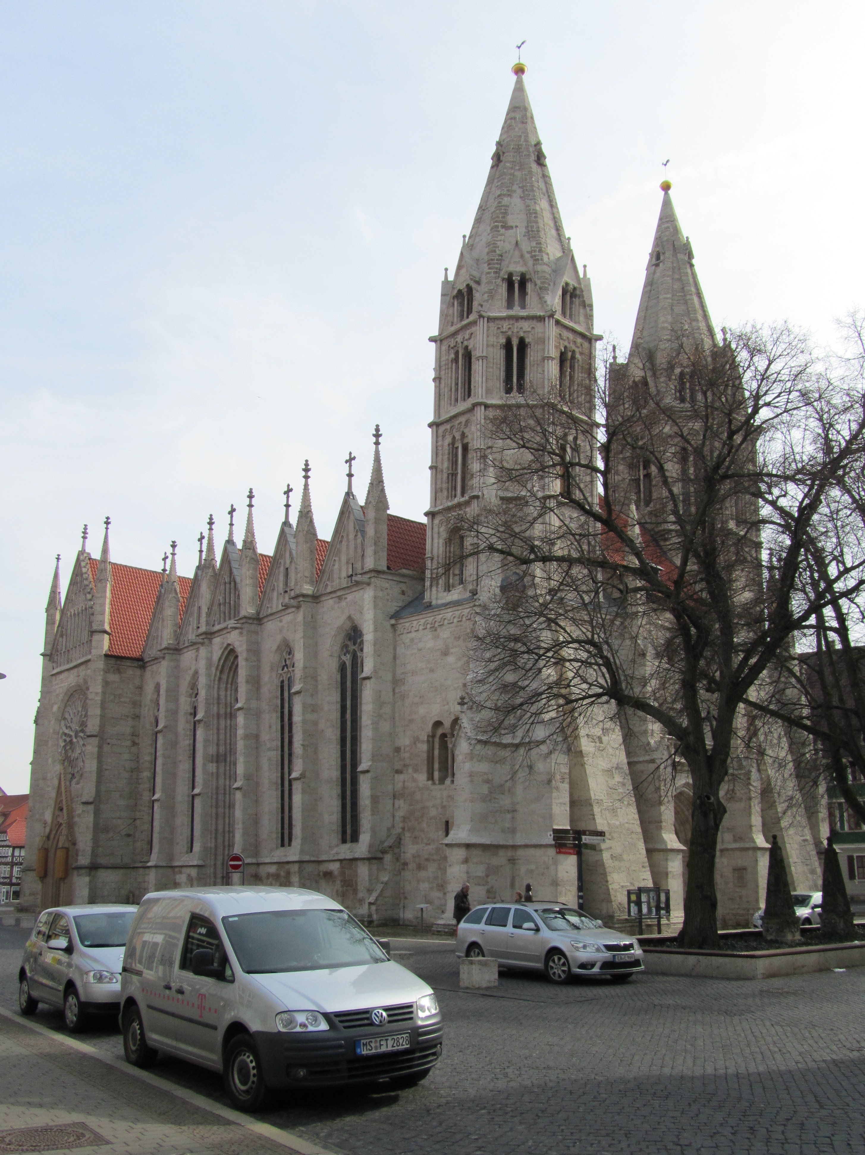 Die Blasiikirche in Mühlhausen (Thüringen).